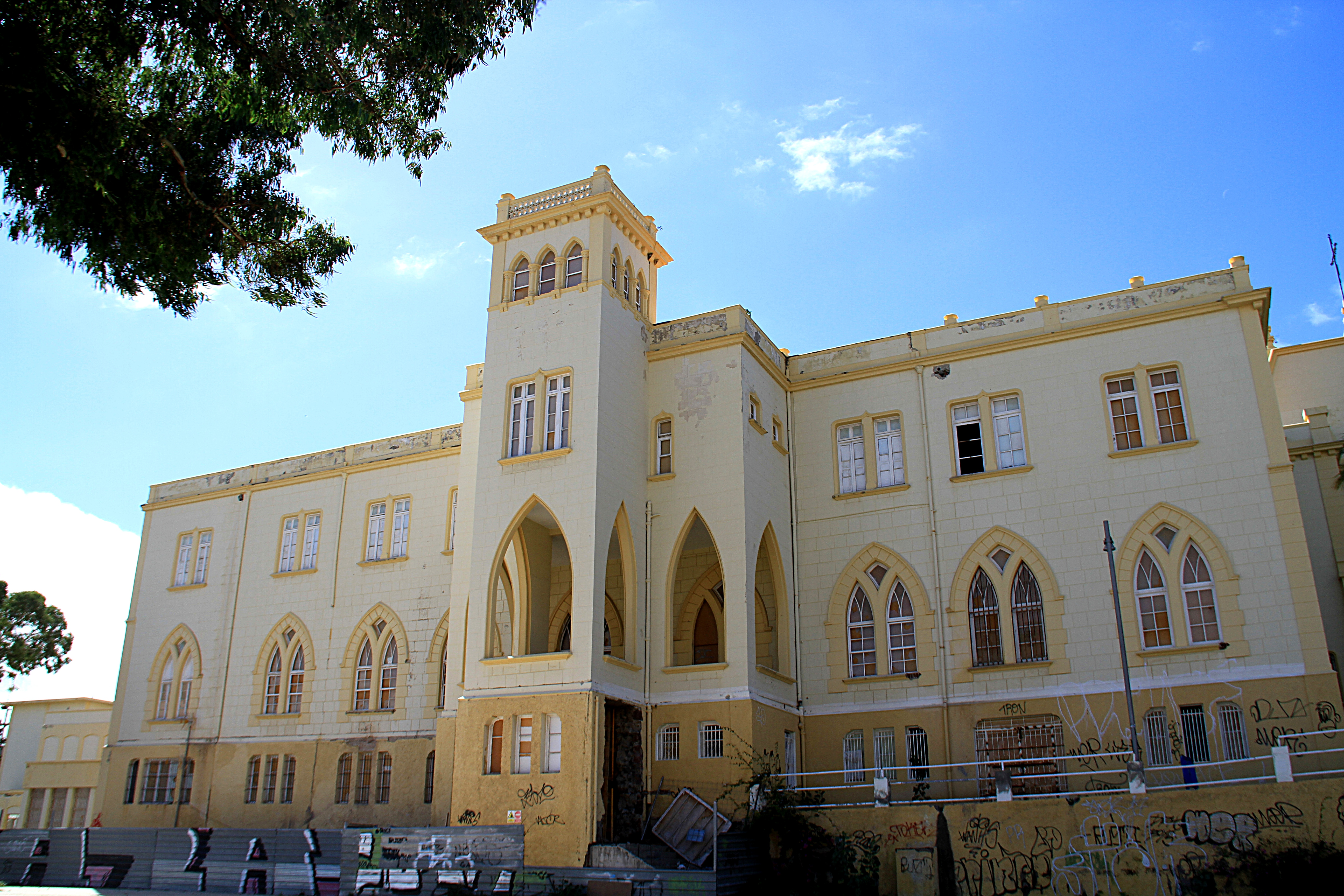 Cara norte del Parque Cultural Viera y Clavijo y anexo Teatro Pérez Minik (izquierda), en estado de abandono a 15 de febrero de 2015. Fotografía: Héctor García Suárez